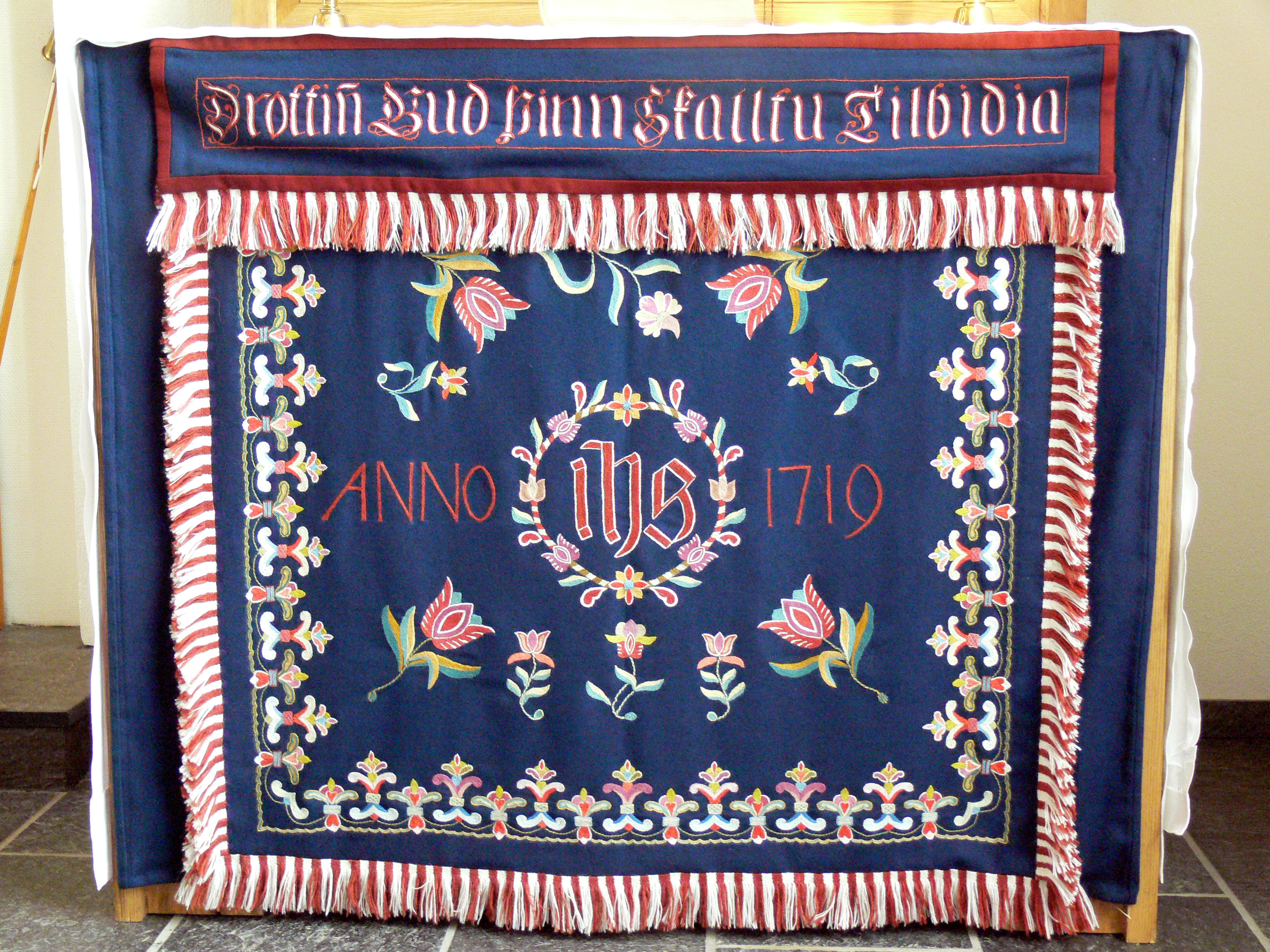 Reykholt Kirche. Antependium des Seitenaltars.